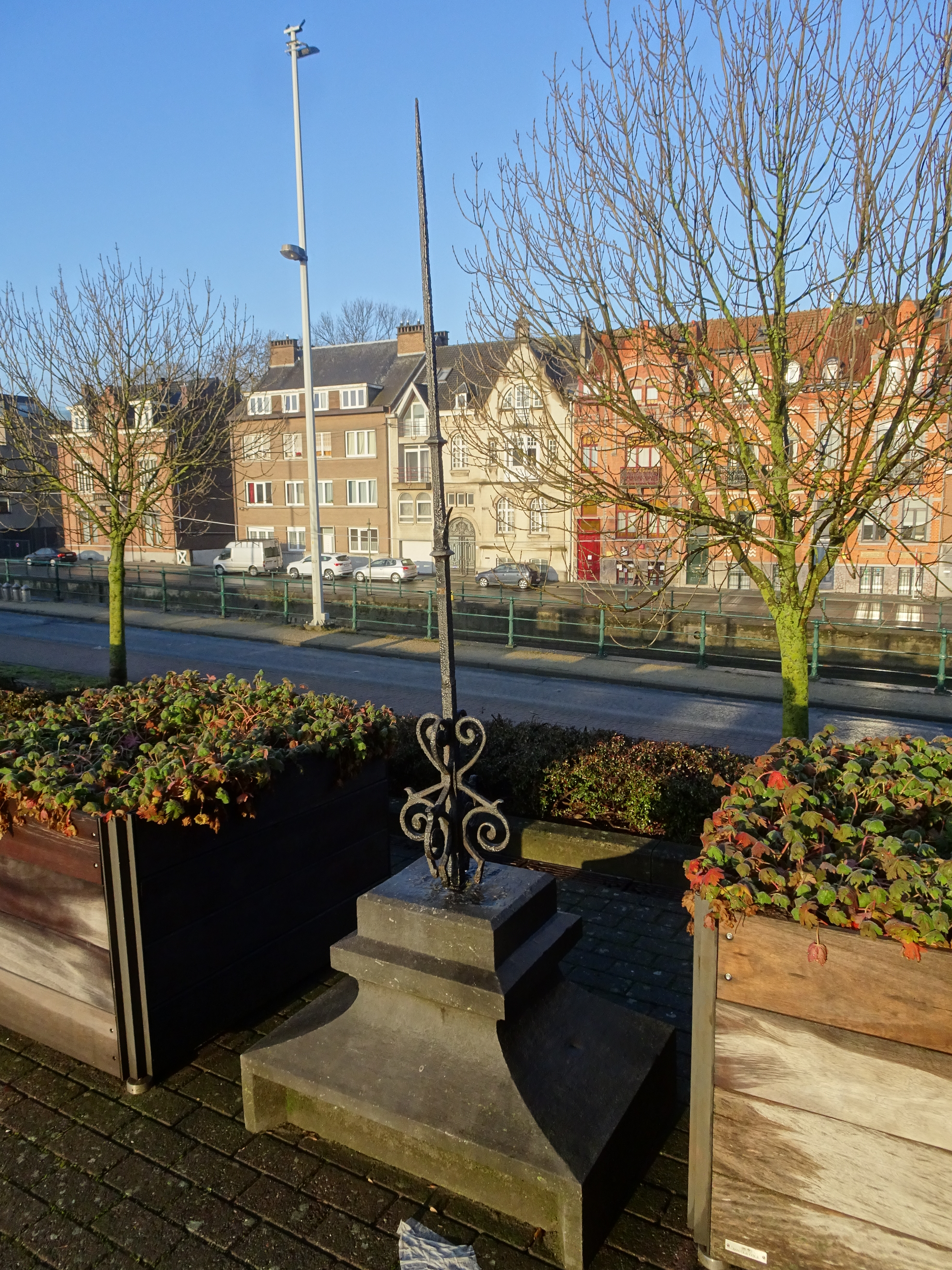 Épi de faîtage de l'ancienne gare de Hal exposé sur le parvis de la nouvelle gare.